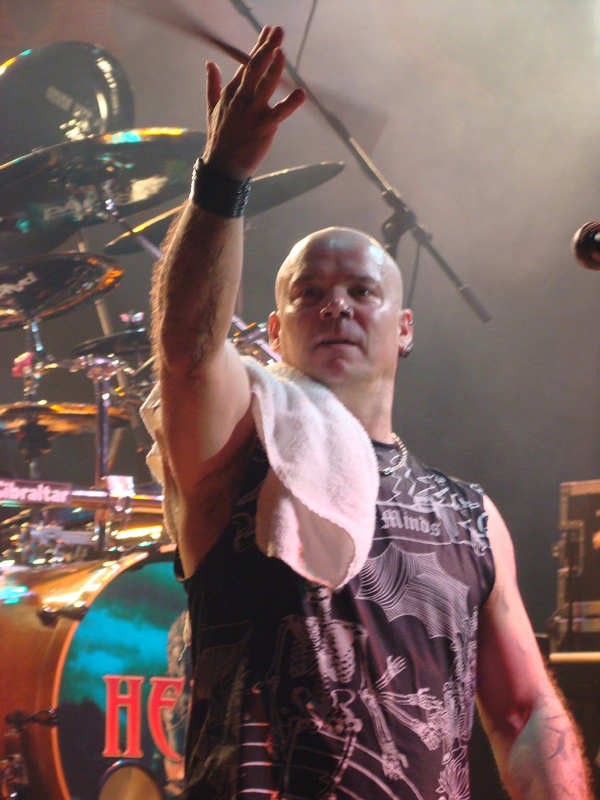 Uriah Heep, Russell Gilbrook